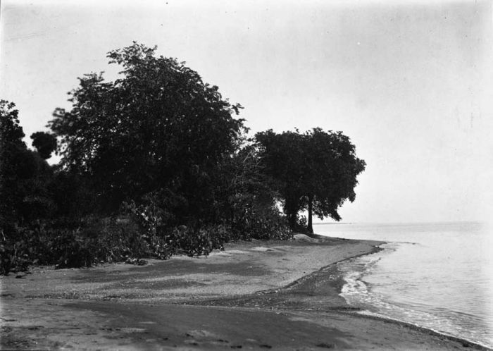 Foto. Kust van de Lemongkrong bij Lekok, Oost-Java